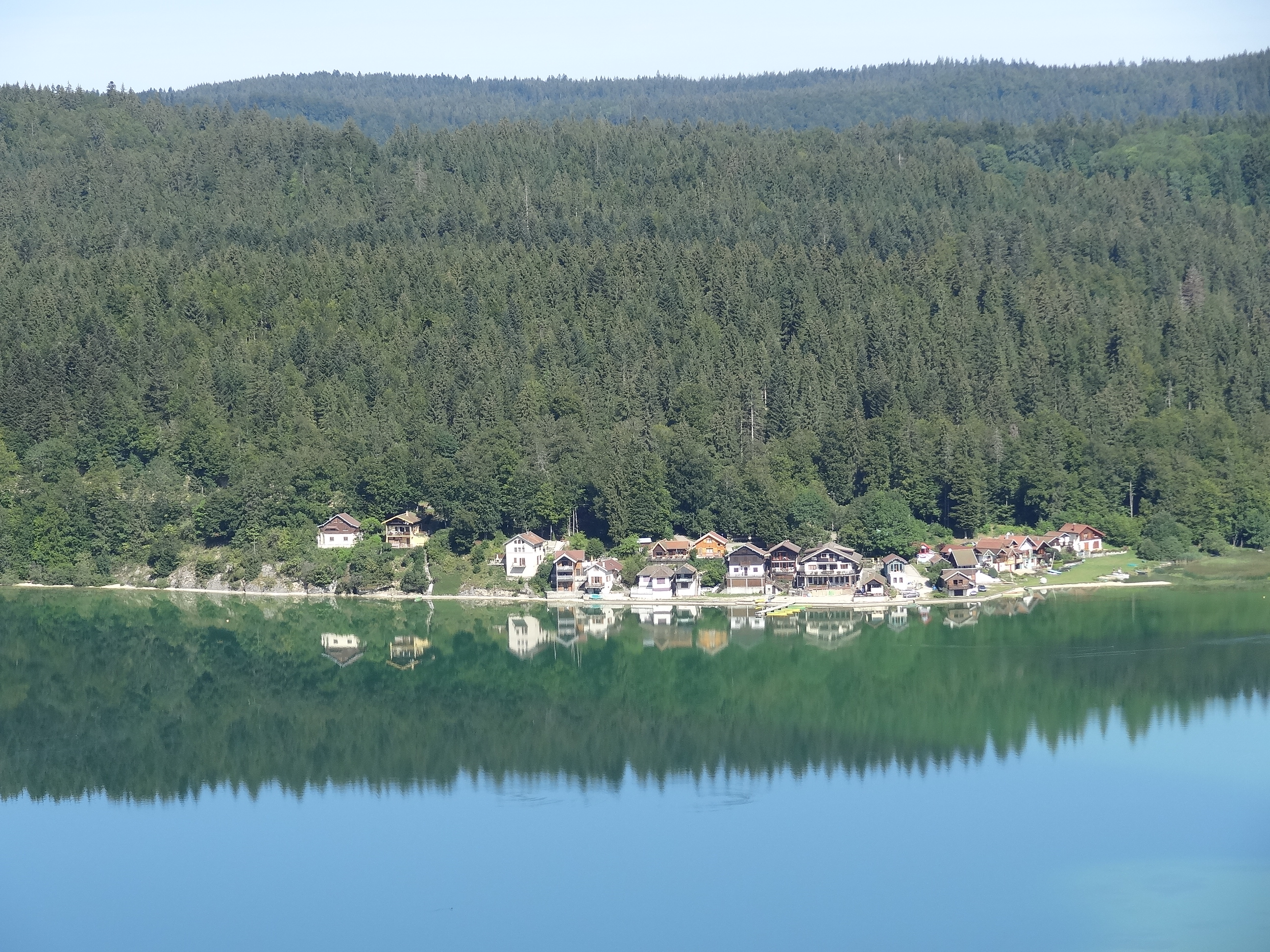 Les Grangettes (Doubs) - Vue de Port-Titi au bord du lac depuis Montperreux